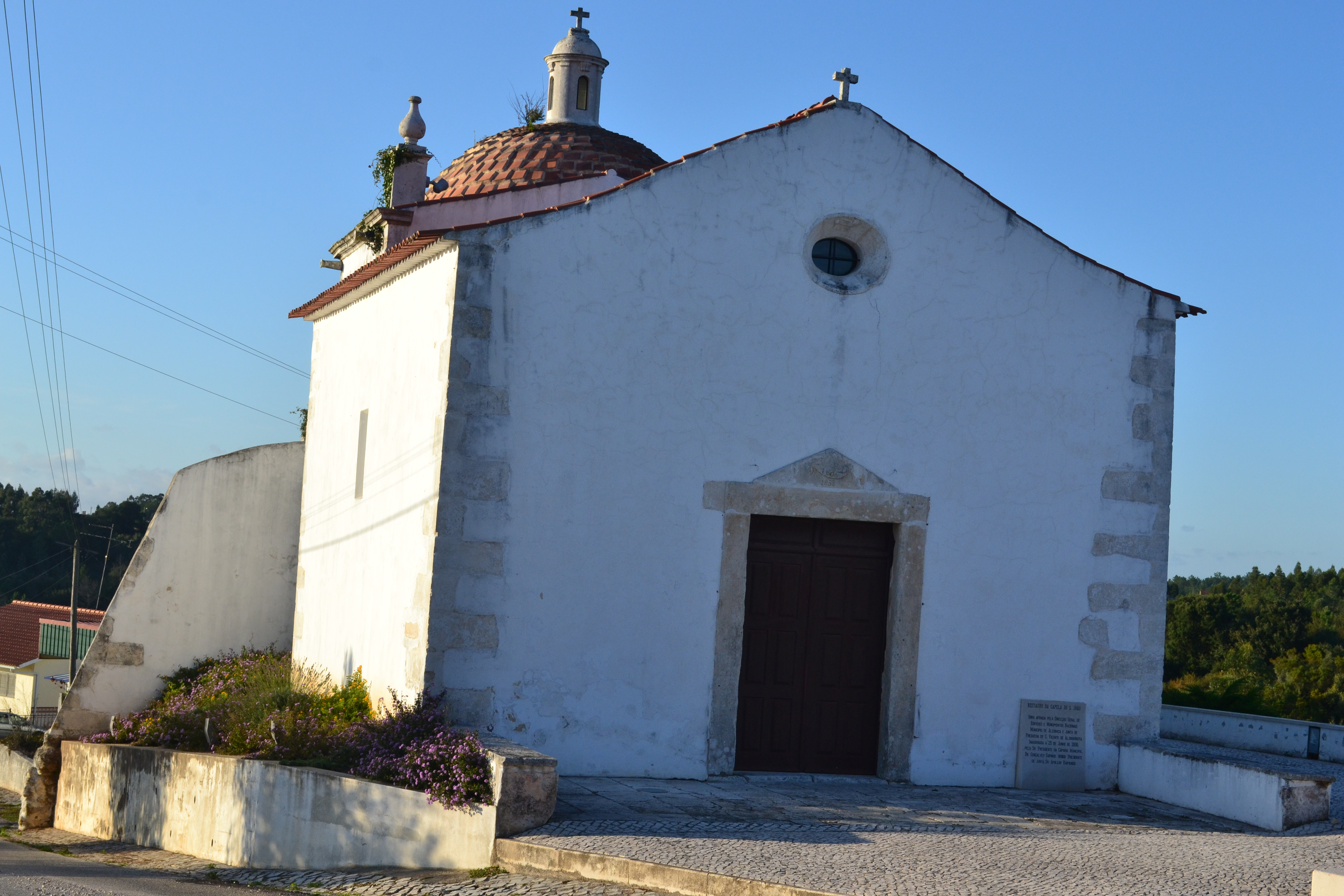 Ermida São João Baptista, lateral e adro This file was uploaded for Wiki Loves Monuments in Portugal with the unique identifier 70866.